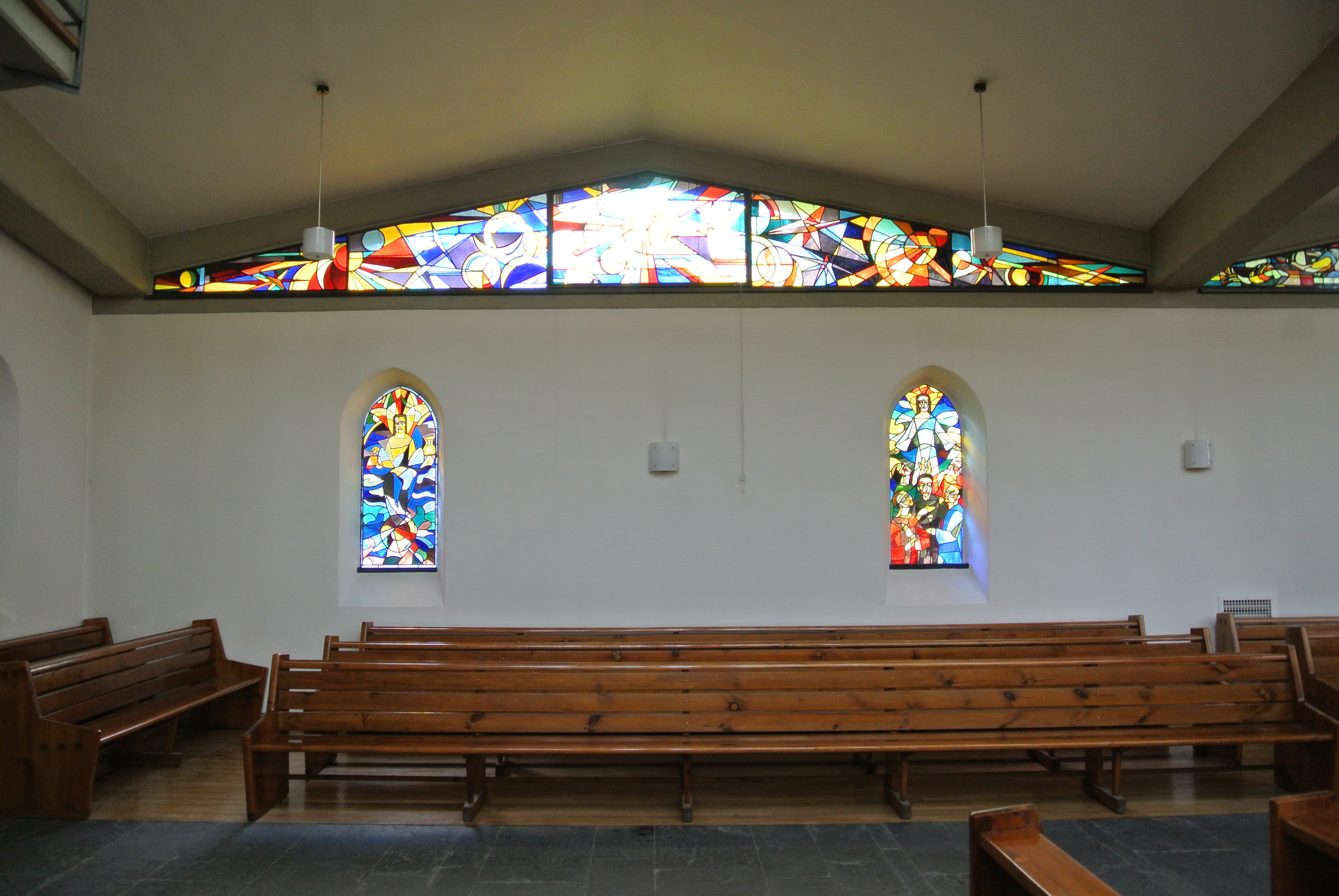 Epiphaniaskirche Seitenschiff, eine Kirche aus den 1950er Jahren des Architekten Karl Wimmenauer unter Verwendung der Ruine der Immanuelkirche von 1903